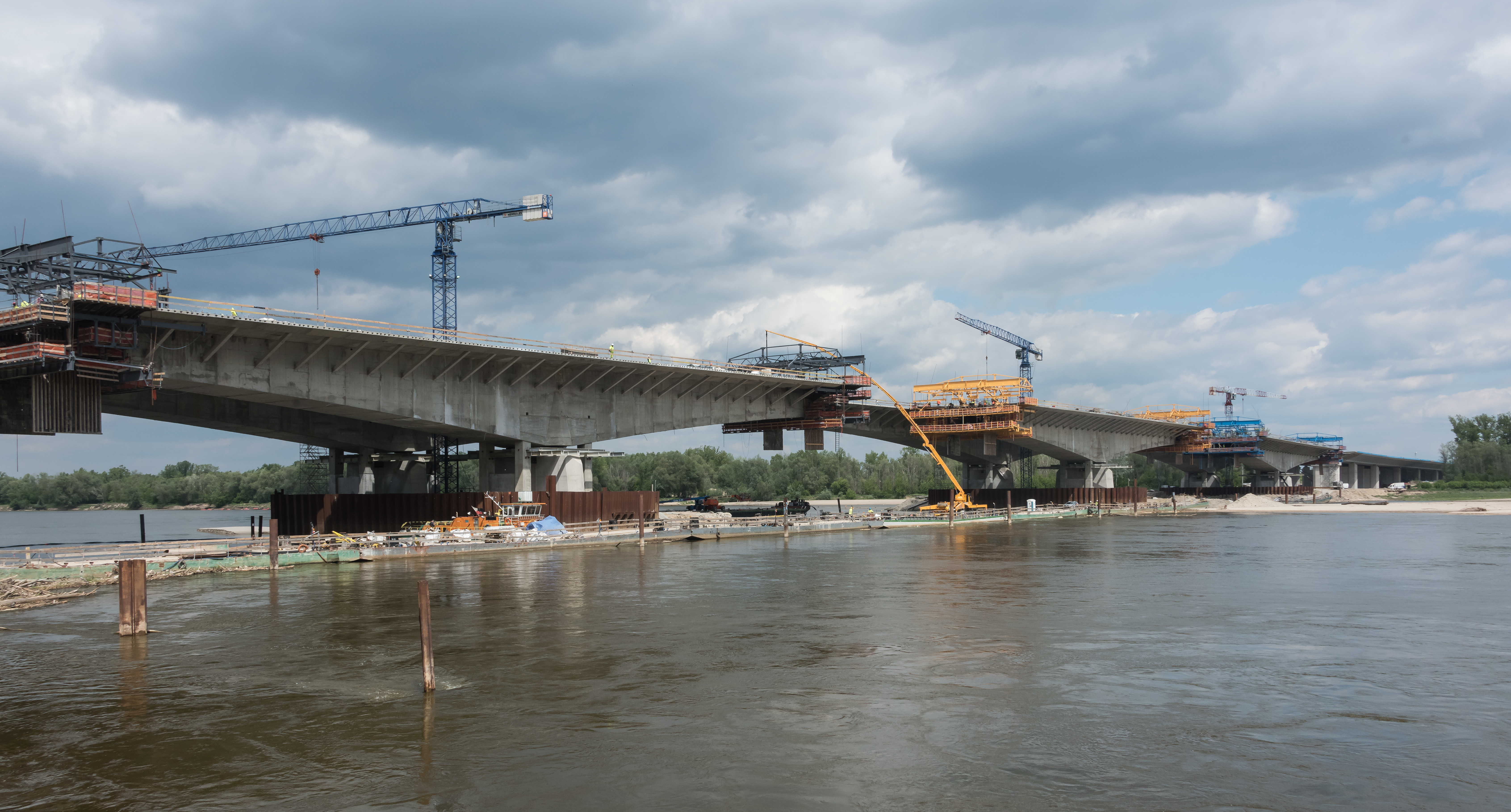 Budowa mostu Południowego w Warszawie, widok z lewego brzegu (Wilanowa)